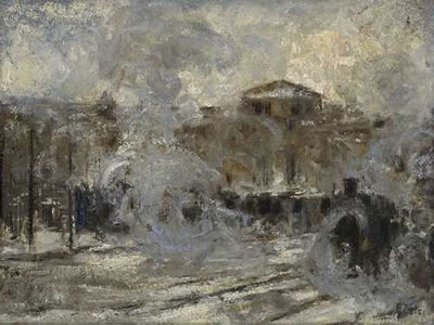 Toni Elster Bahnhof München44 x 57,5 cm (17,3 x 22,6 in)